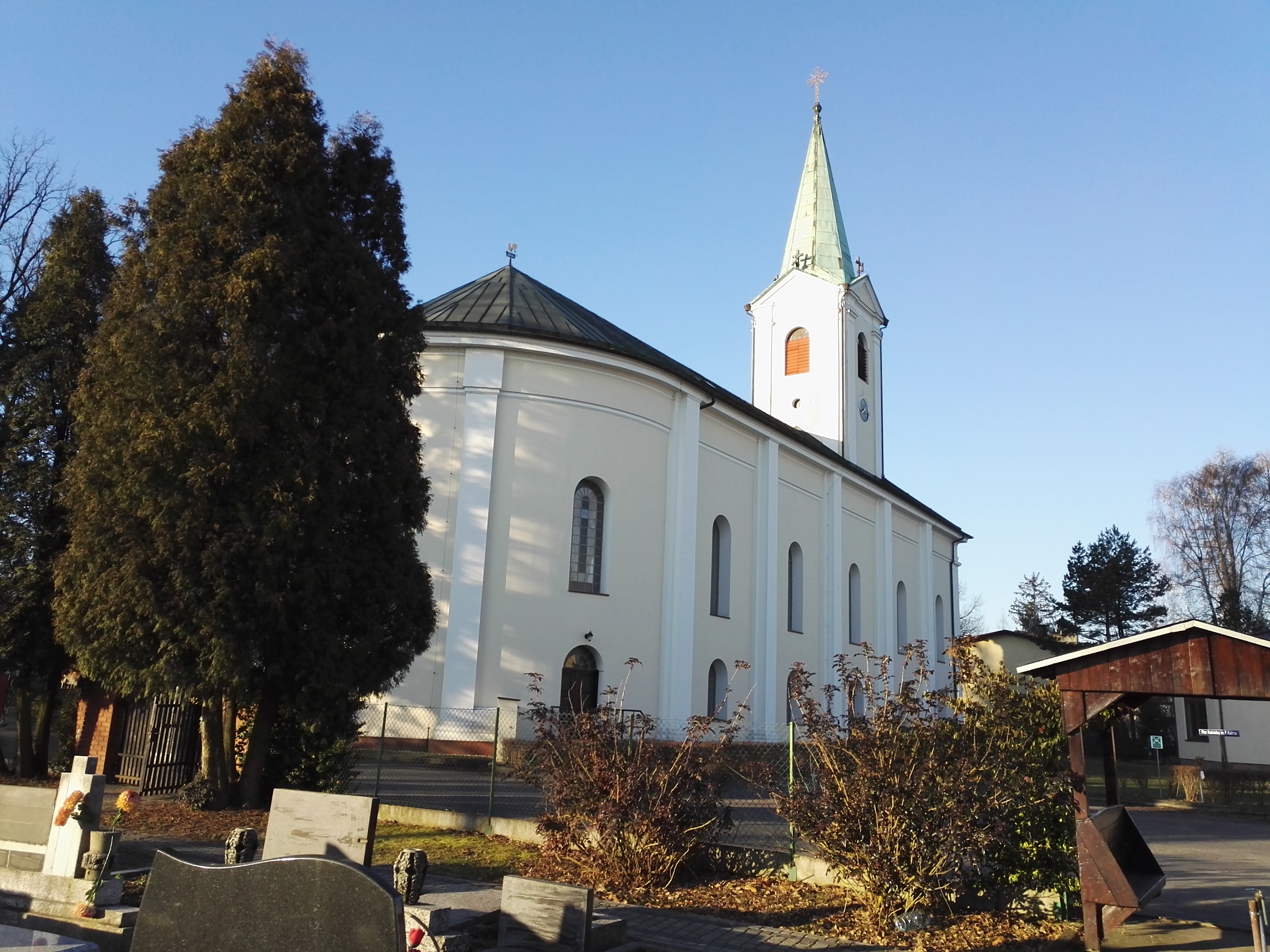 Drogomyśl (Drahomyšl).Pohled na evangelický kostel od hřbitova.